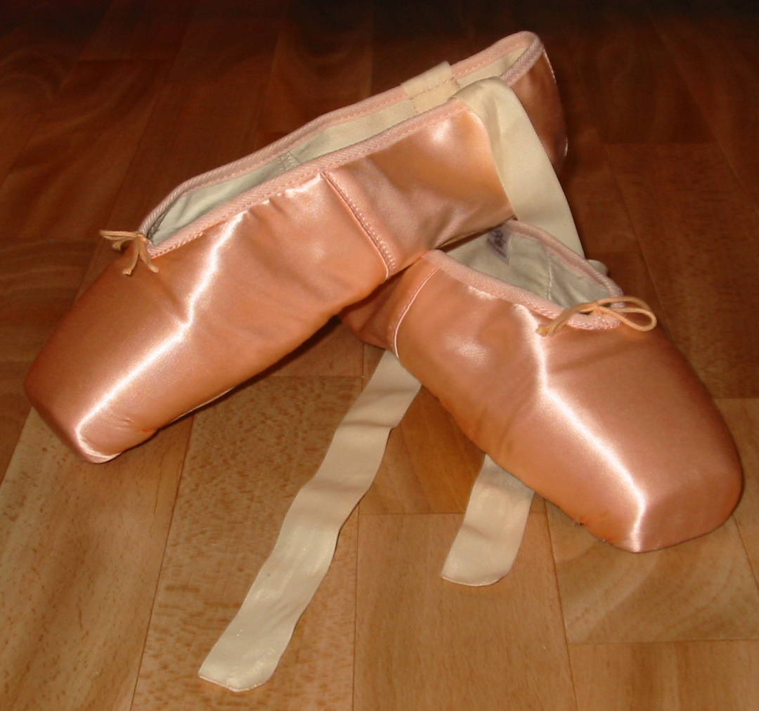 Zu sehen sind hier ein Paar neuer (=ungetanzter) Spitzenschuhe (Ballett). Es handelt sich um meine eigenen Ballettschuhe, die auch von mir selbst fotografiert wurden. Jeder kann das Bild uneingeschränkt verwenden.